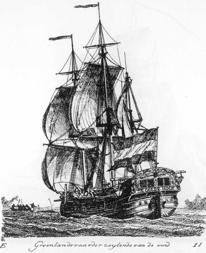 Groenlandsvaarder zeylende van den wind